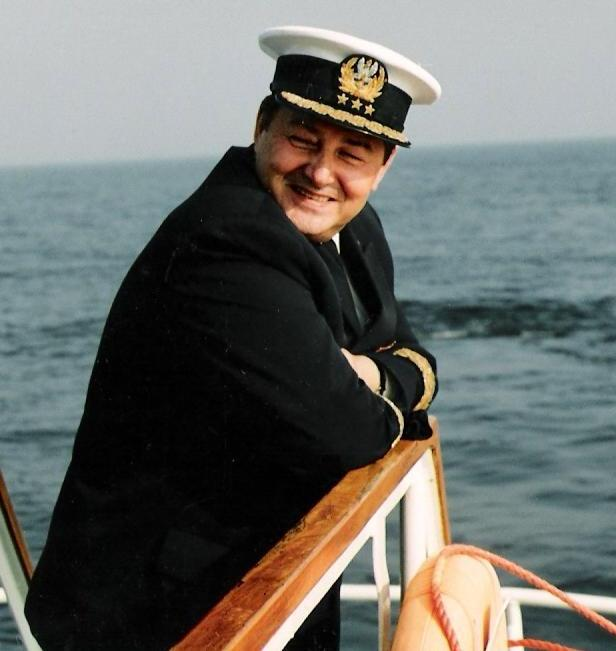 adm. floty Ryszard Łukasik kkic (dyskusja) 00:21, 18 sie 2008 (CEST)